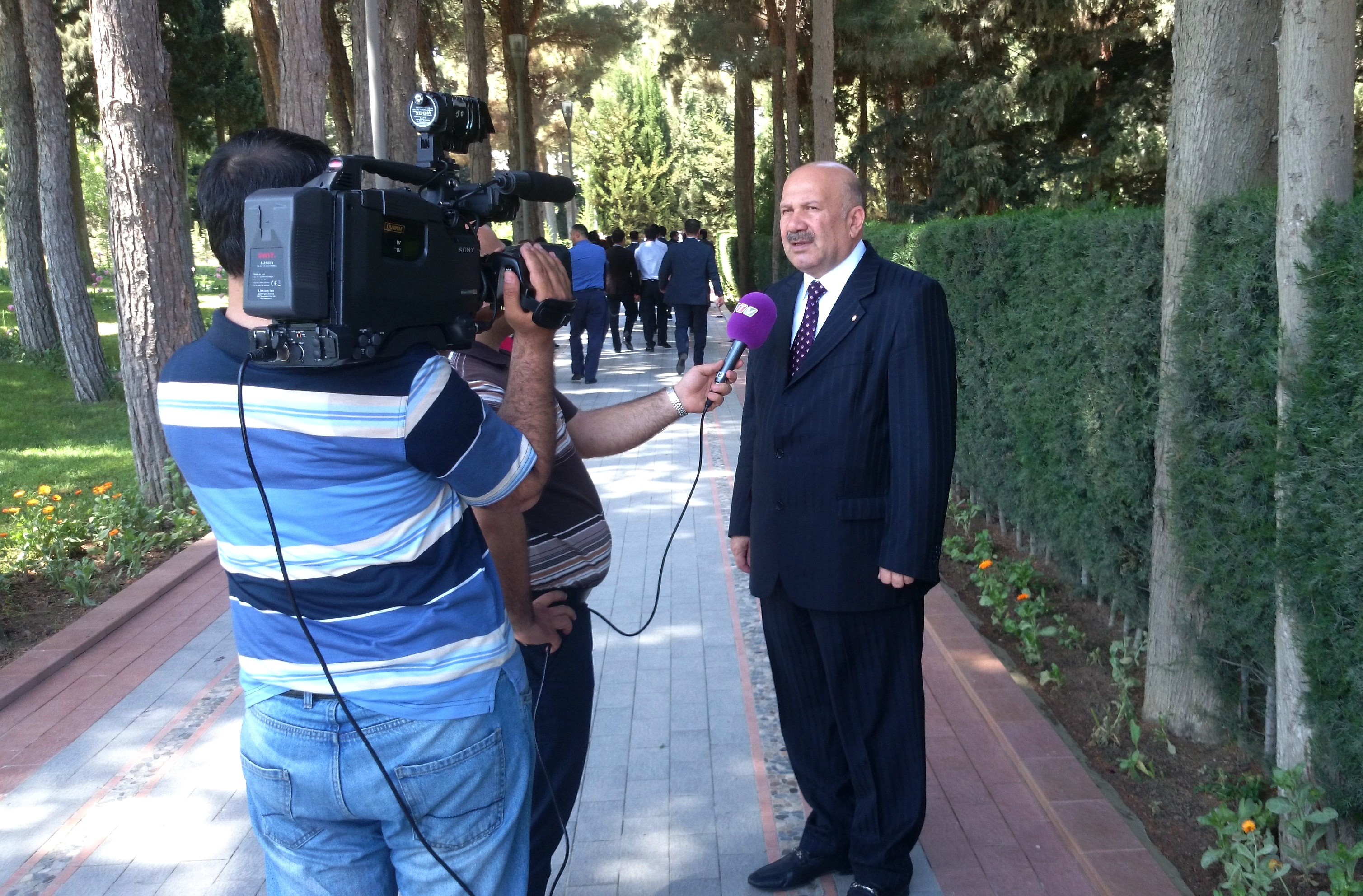 Səyyad Aran İctimai TV-yə müsahibə verərkən